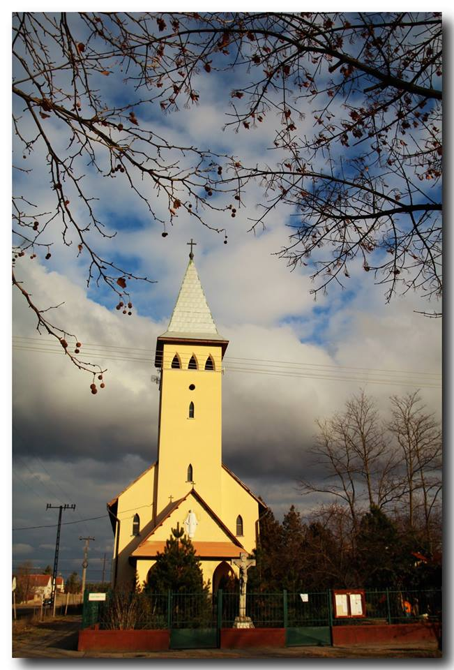 A fotót a településen élő amatőr fotóművész, Magyar József készítette.